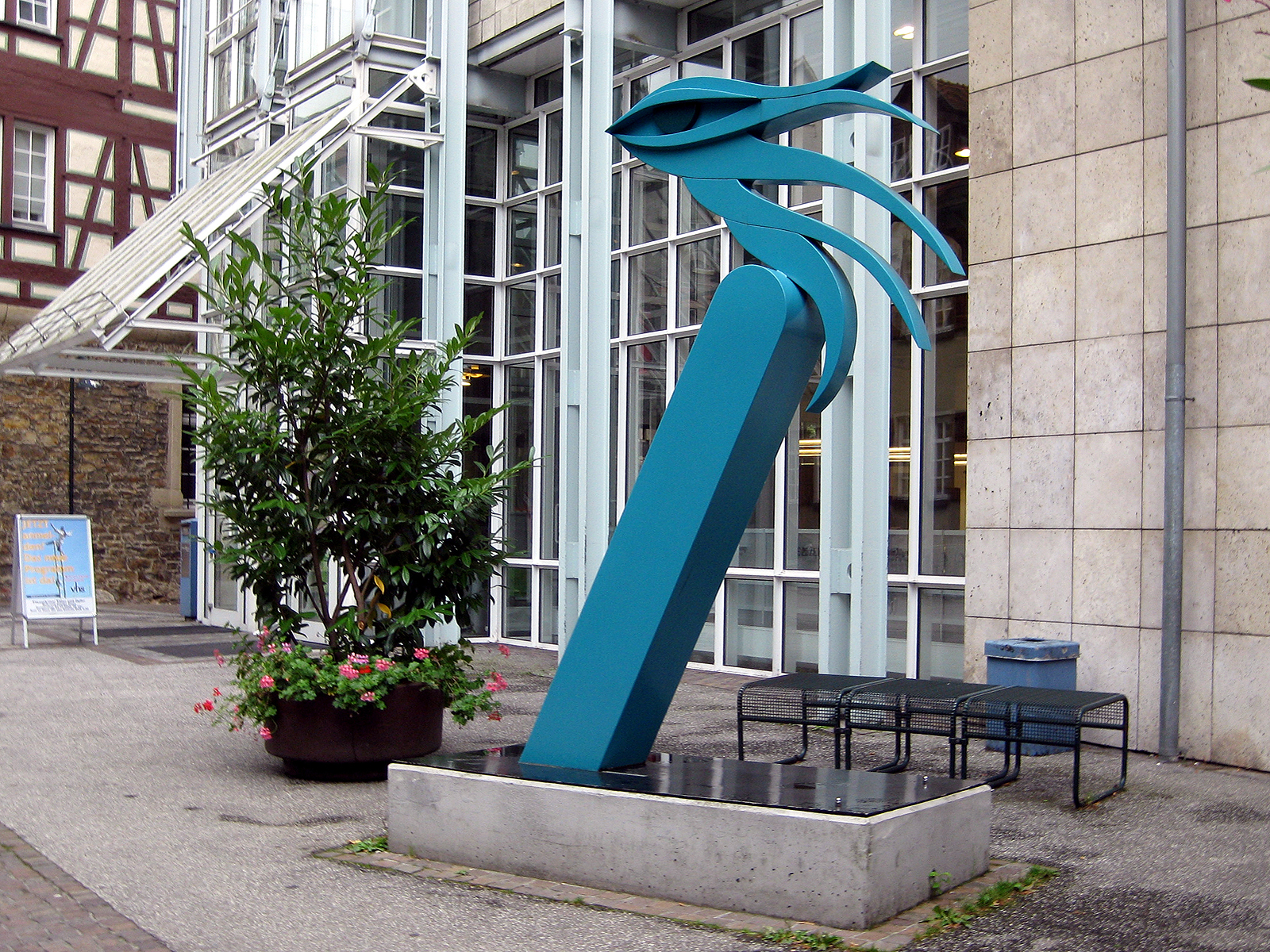 Gudrun Krüger, Vogelauge, 1985, Deutschland, Baden-Württemberg, Reutlingen